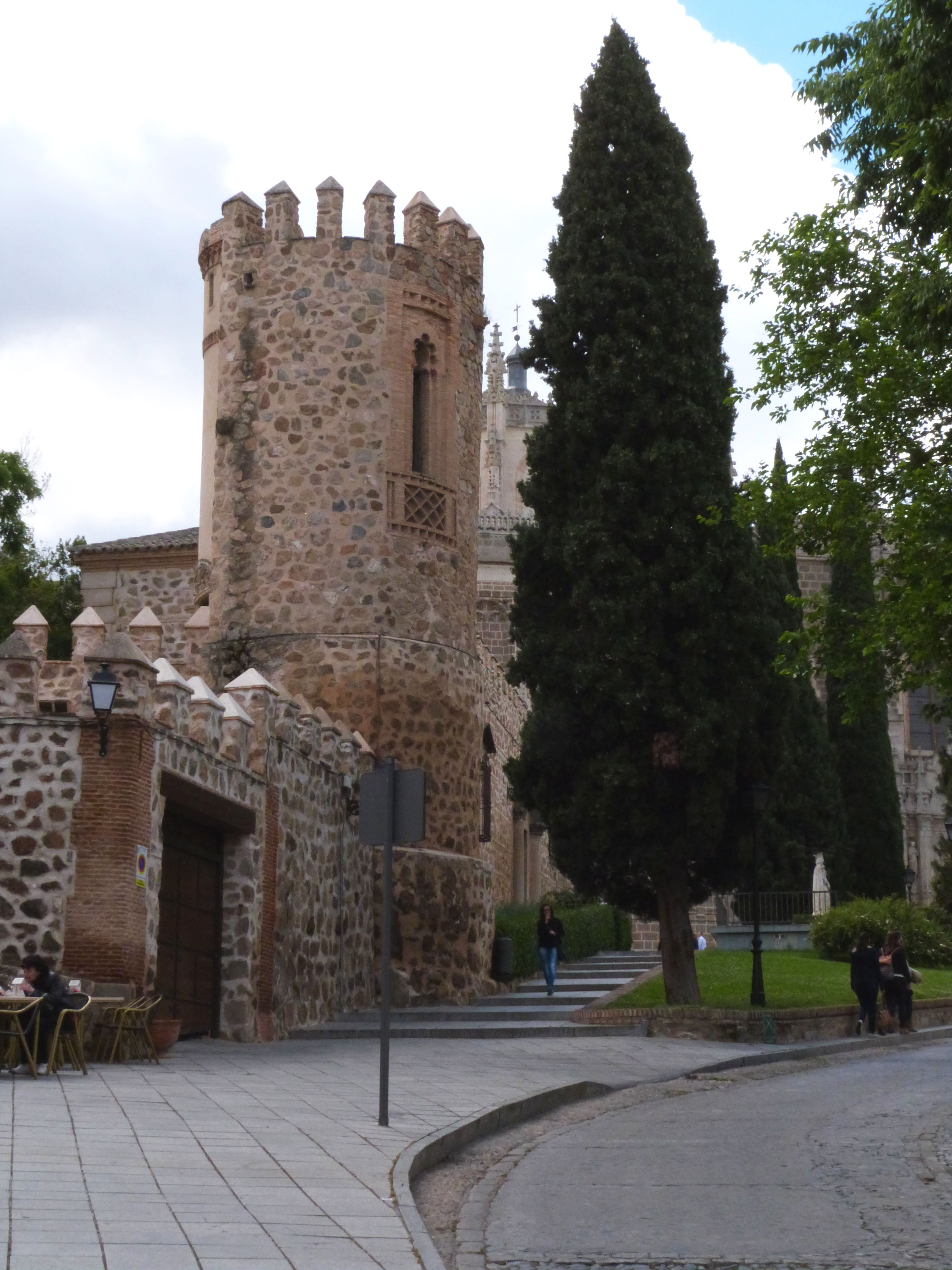 Stadtmauer beim Kloster San Juan de los Reyes, toledo